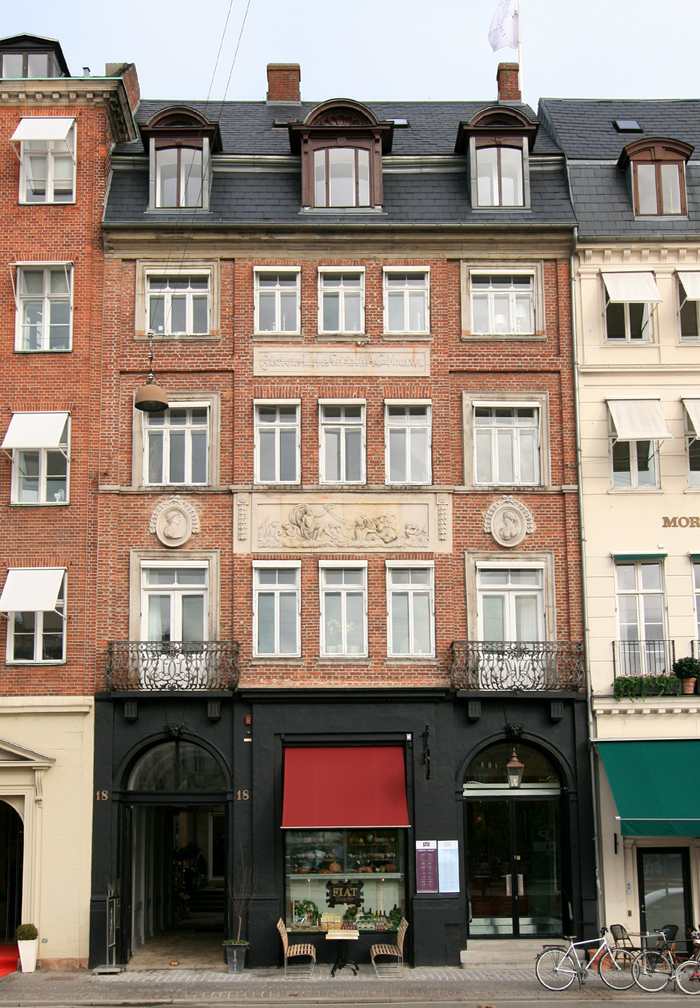 Lihmes Gård, Kongens Nytorv 18, København. Bygget 1787. Fredet.